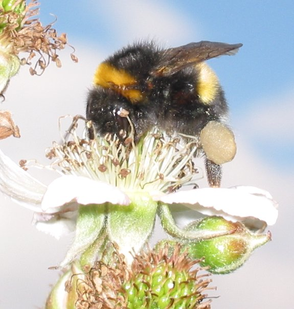 zelfgemaakte foto van kleine aardhommel Bombus lucorum (veldhommel) op braam; begin juli